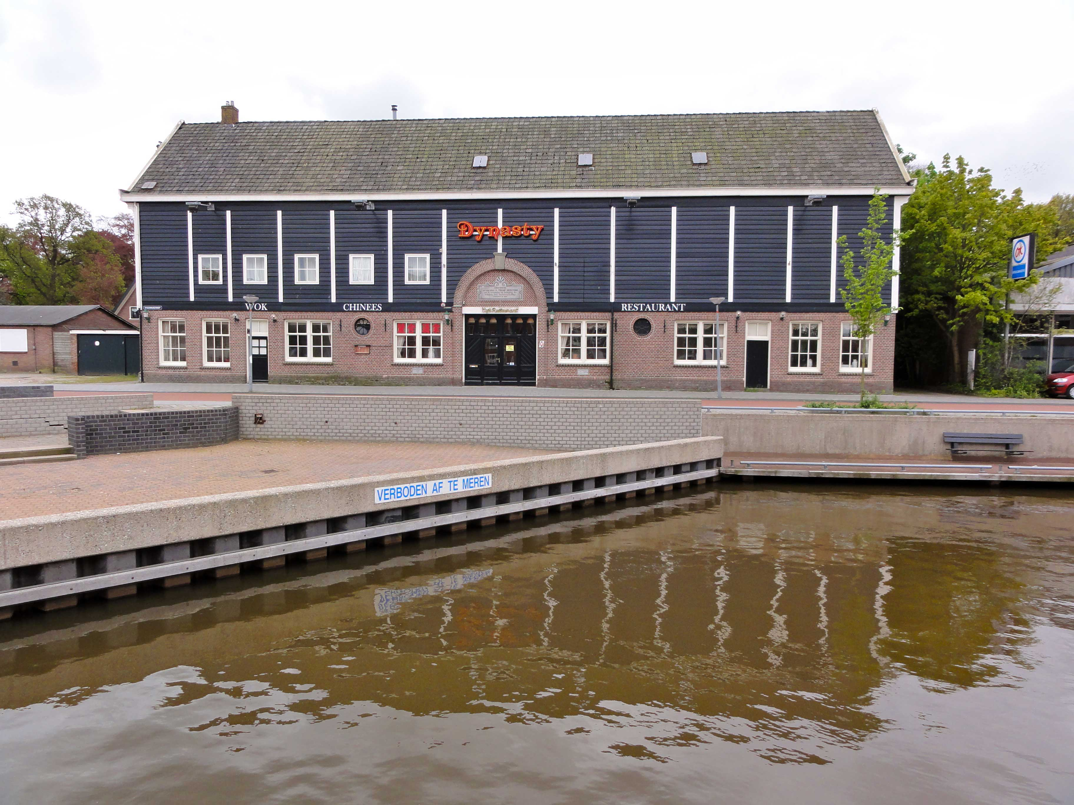 Steenwijkerdiep 71 Steenwijk (rijksmonument)